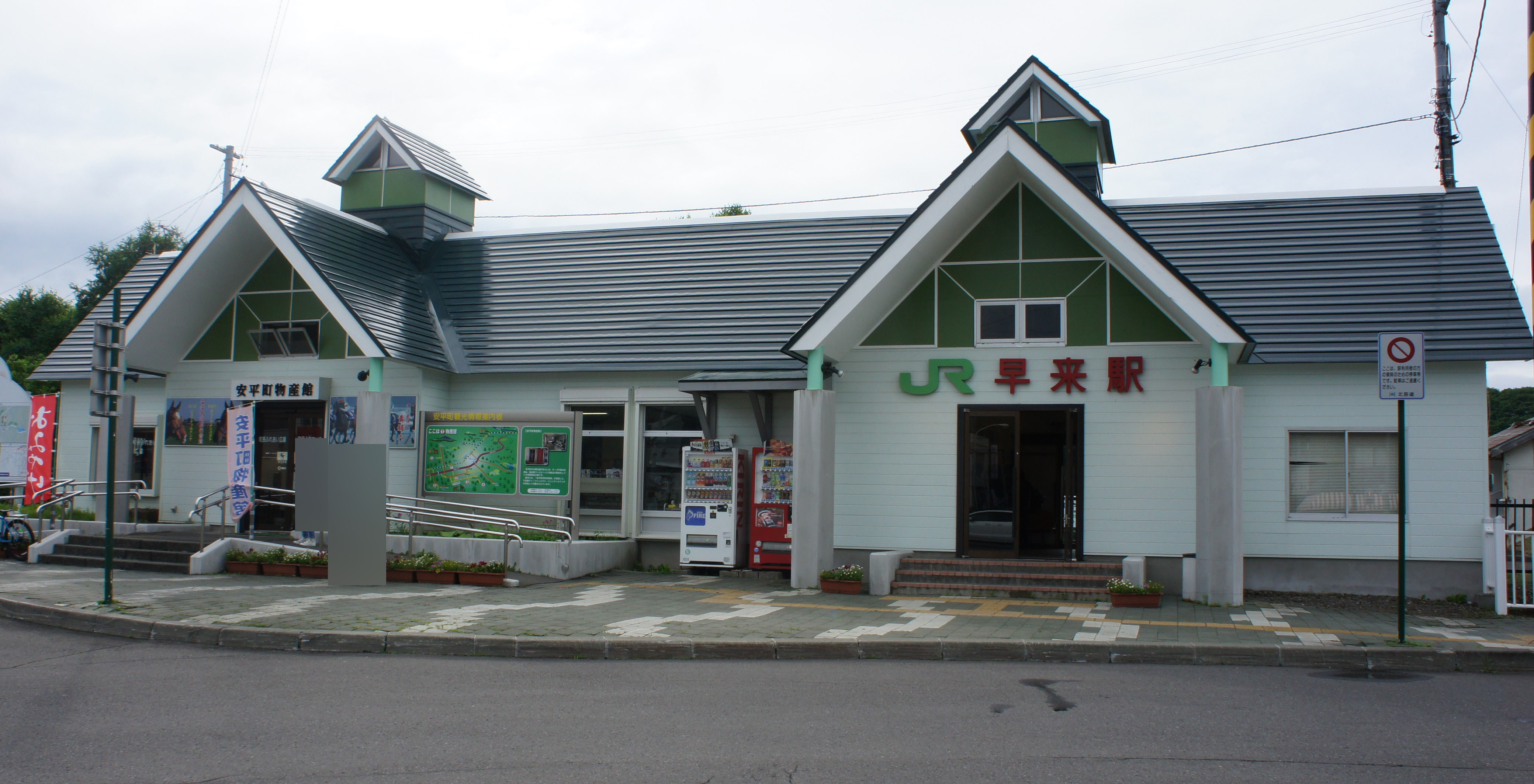 JR室蘭本線・早来駅の駅舎